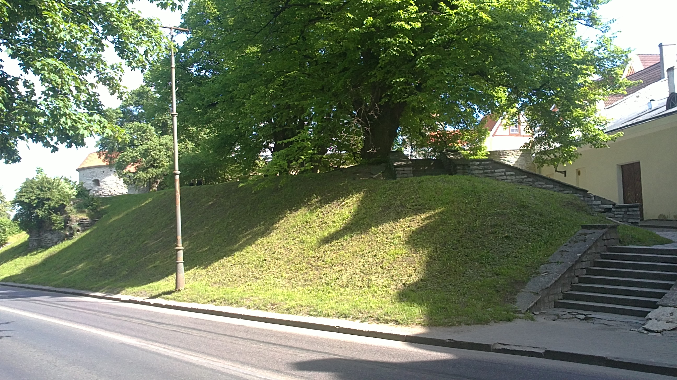 Tallinna muldkindlustusvööndi Skoone bastioni lõunavall, mida lahutab Rannamäest, Rannamäe tee, vaade Rannamäe teelt Balti jaama poolt